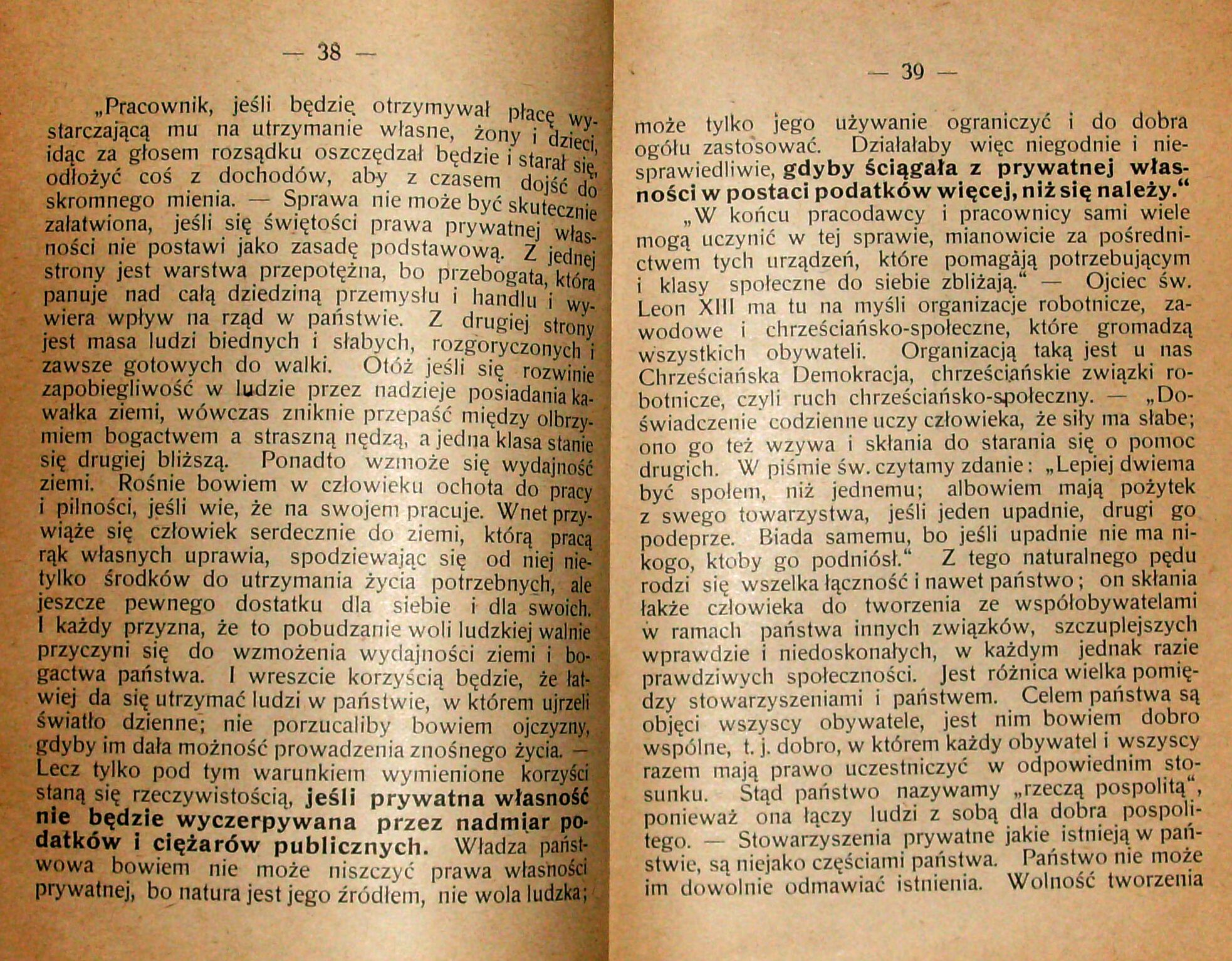 Stanisław Krzyżowski, Rozmyślania w czterdziestą rocznicę encykliki „Rerum novarum”, wydanej 15 maja 1891 r. przez papieża Leona XIII, Pszczyna 1931